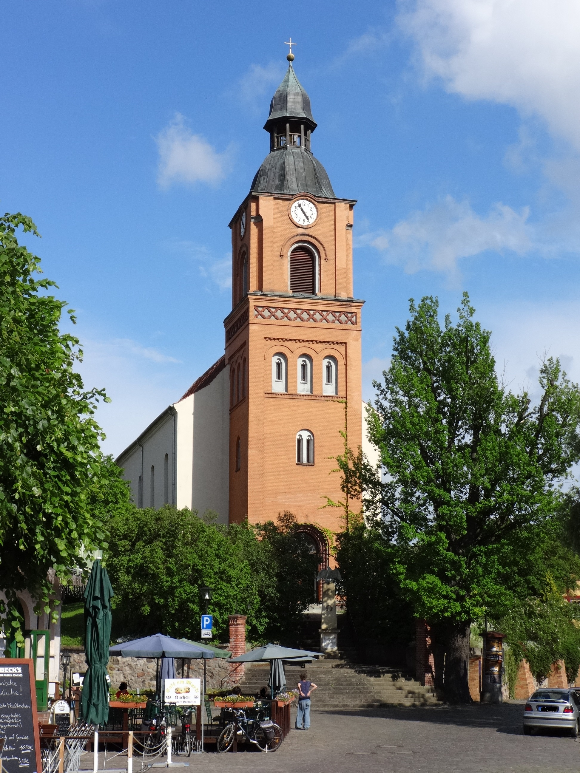 Mittelalterliche Stadtpfarrkirche in Buckow (Märkische Schweiz) in Märkisch-Oderland, Brandenburg Durch Brände 1665 und 1686 zerstört und wieder aufgebaut wurde sie im Zweiten Weltkrieg erneut zerstört und aufgebaut.